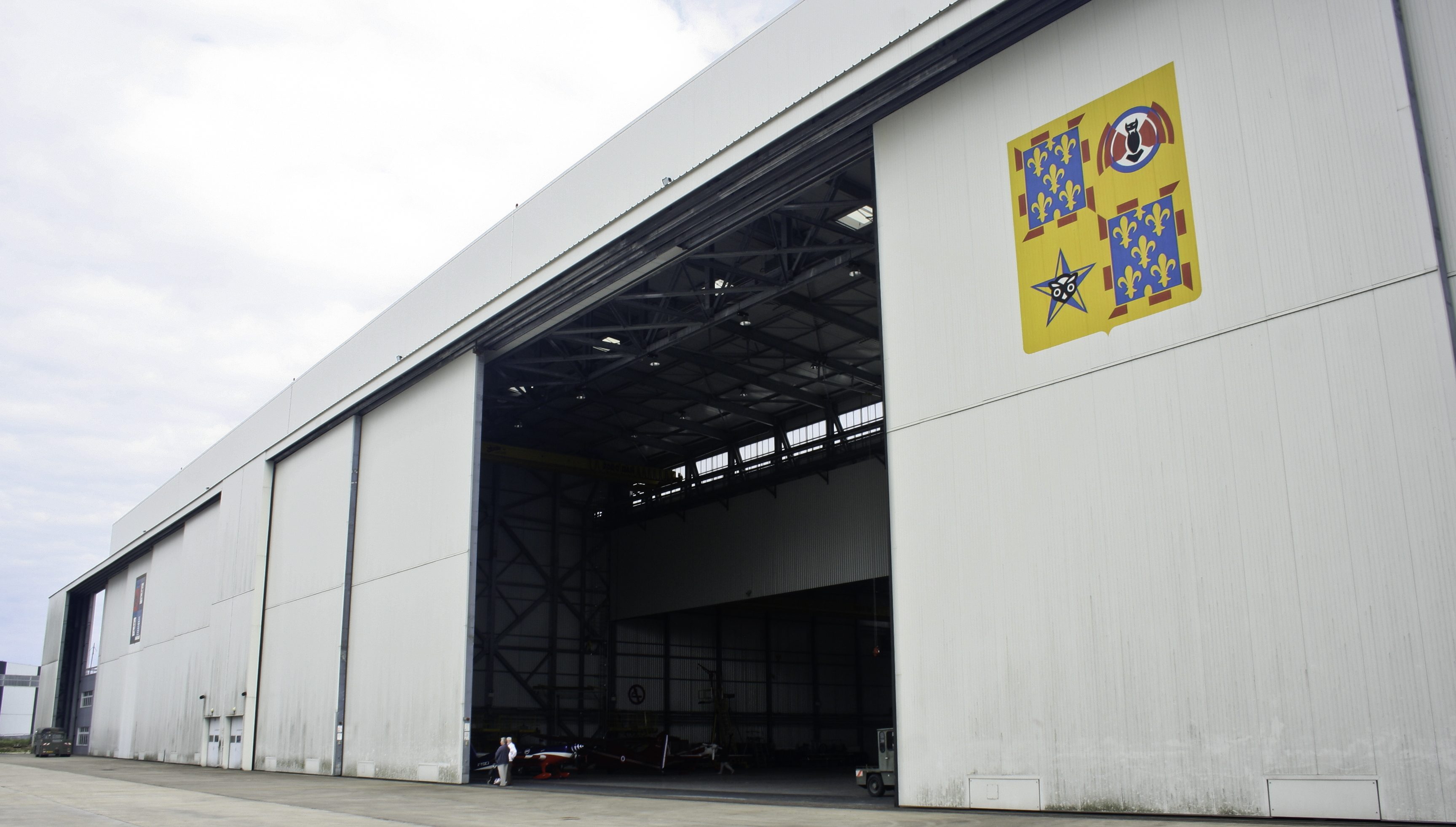 Hangar del'ET 1/621 Touraine sur la BA123 d'Orléans-Bricy